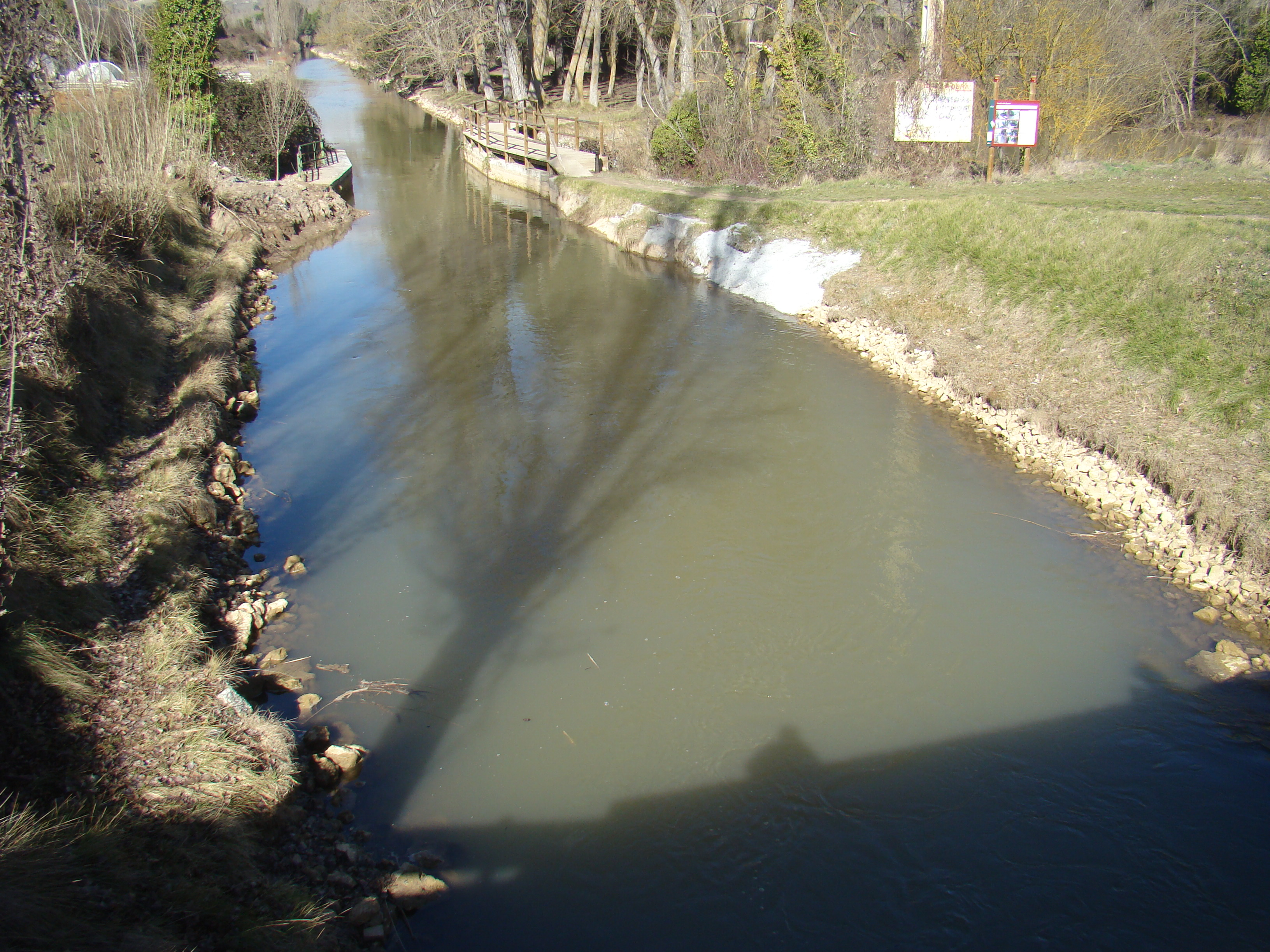 Sardón de Duero, Valladolid, España. Canal del Duero que transcurre paralelo al río Duero. Puede verse a la derecha el puentecillo que salva el curso del arroyo Valimón.